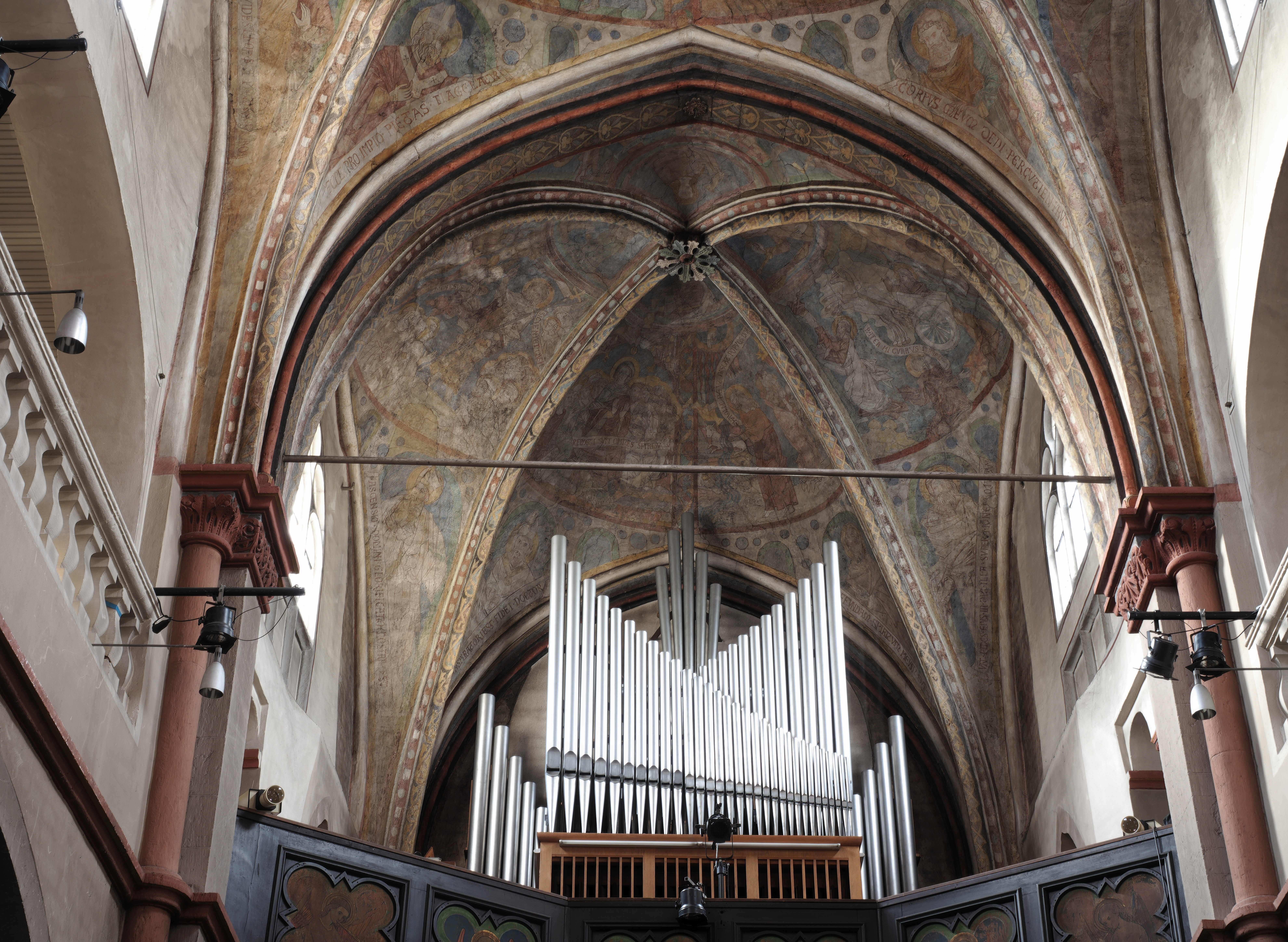 Köln, Romanische Kirche Sankt Maria in Lyskirchen, Orgel. Die Ausmalung der Kuppel über der Orgel ist aus dem Jahr 1880